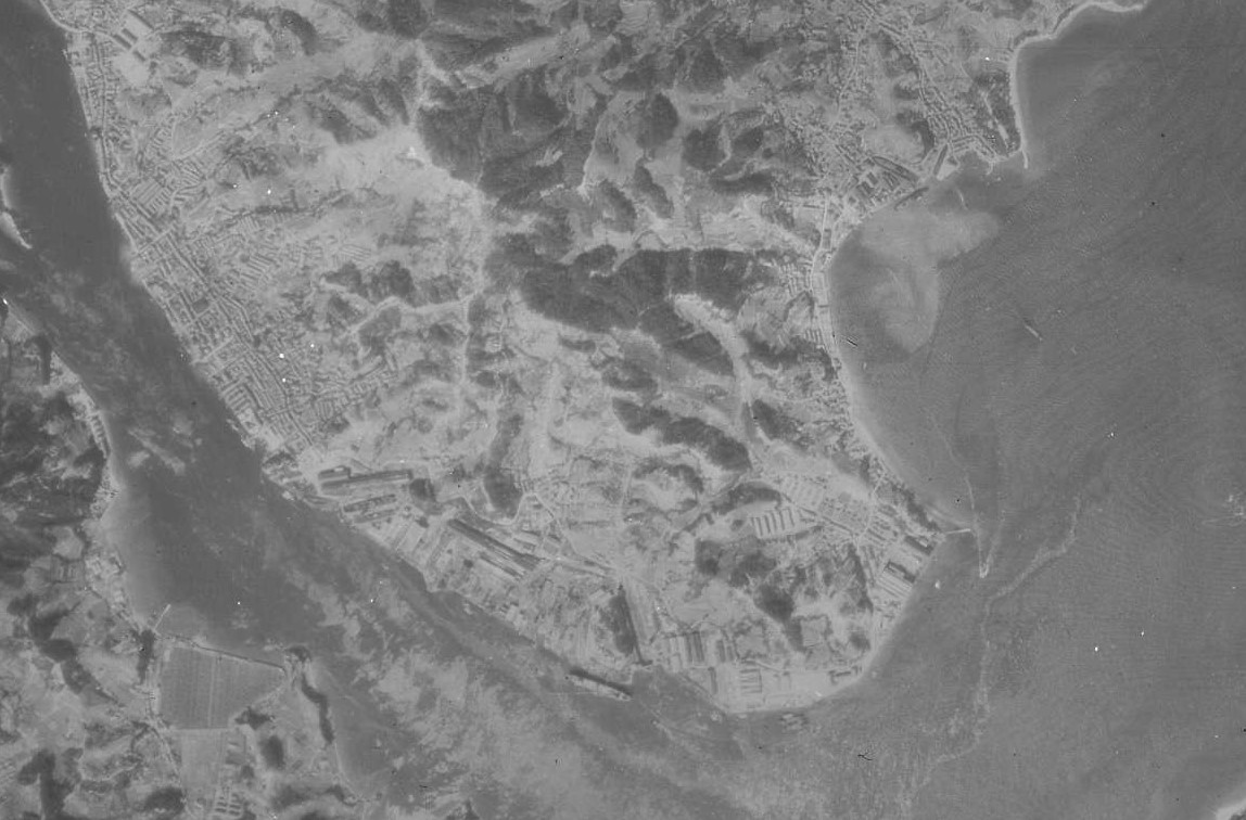 1947年の広島県因島南部の空中写真。左下が日立造船因島工場、右上が三庄工場。